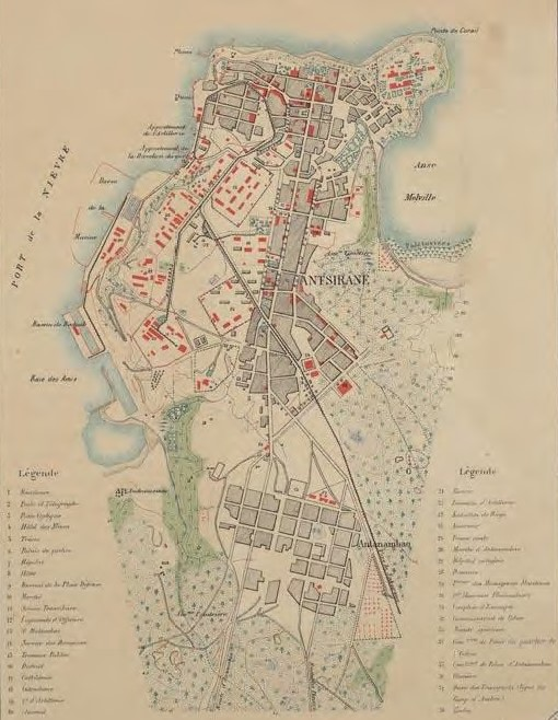 Plan d’Antsirane datant de 1912